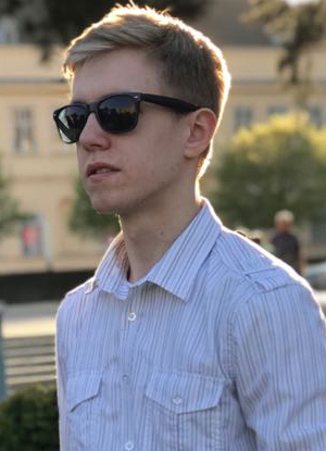 Vesely Marek - Filmregisseur